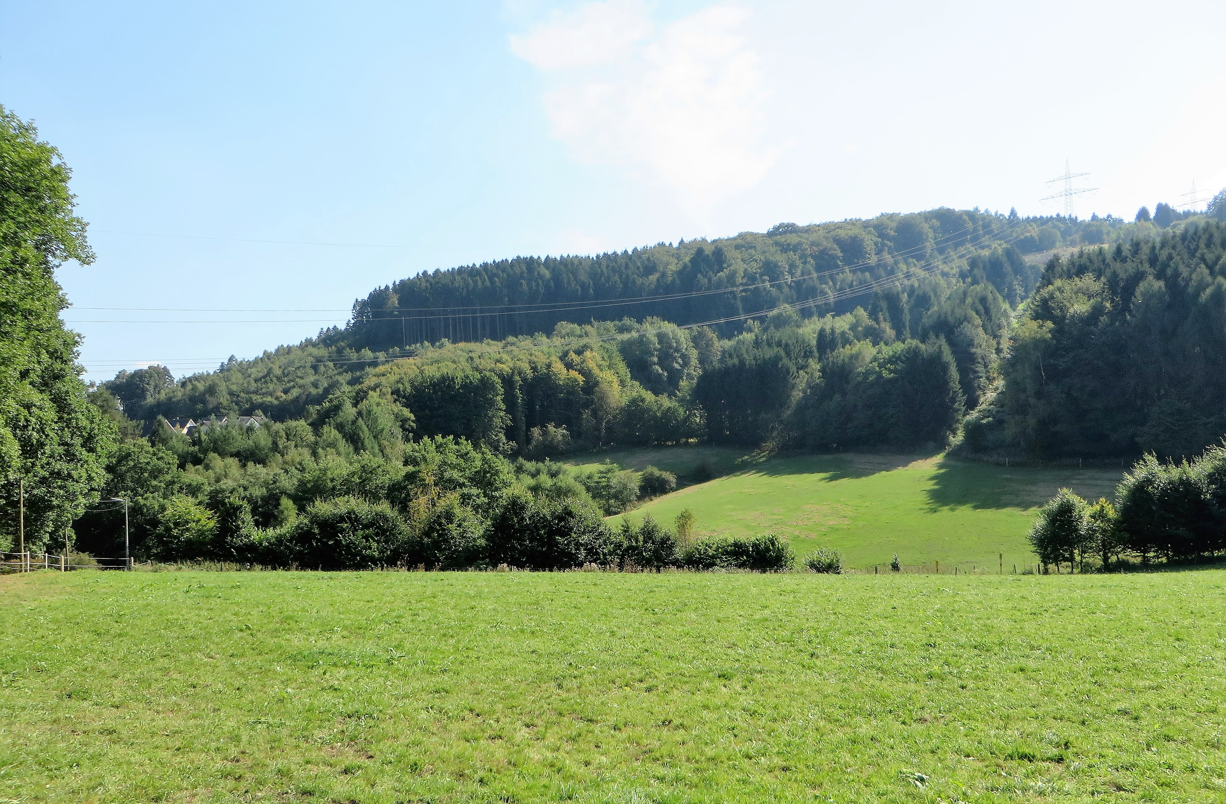 Geschützter Landschaftsbestandteil „Leitmecke“ in Hagen, nordwestlich von Dahl, südlich des Ribberthofes. Es handelt sich um feuchtes Grünland mit mehreren Bachsiepen, einem Teich und altem Baumbestand. Der geschützte Bereich liegt im Landschaftsschutzgebiet „Eilper Berg/Langenberg“.